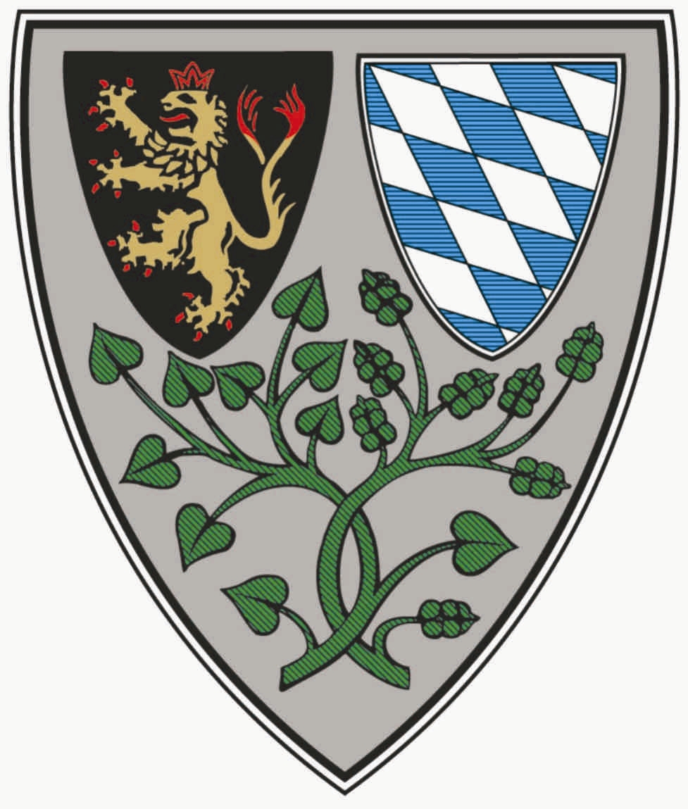 Wappen der Stadt Braunau am Inn